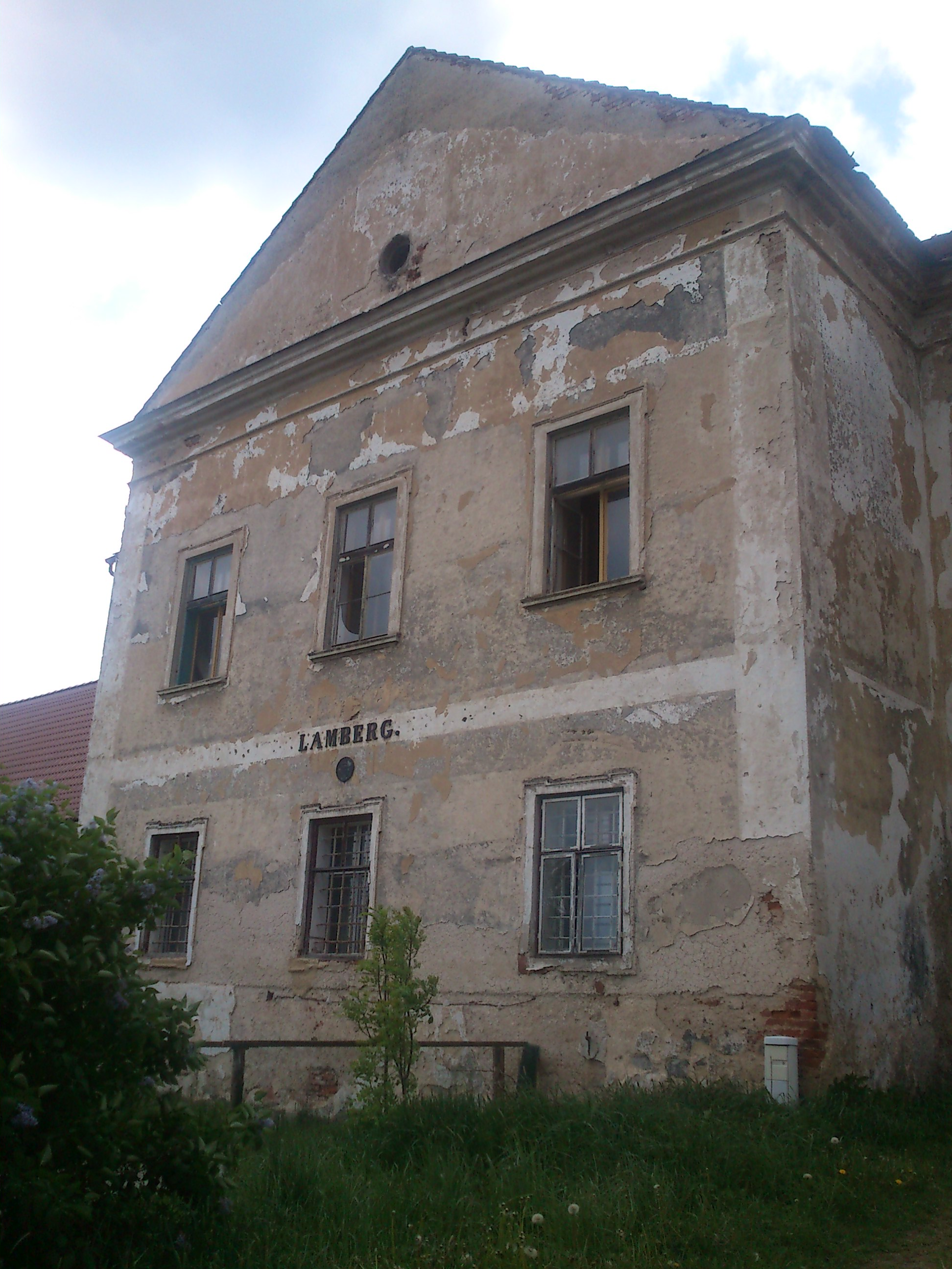 Budova zámku od jihovýchodu